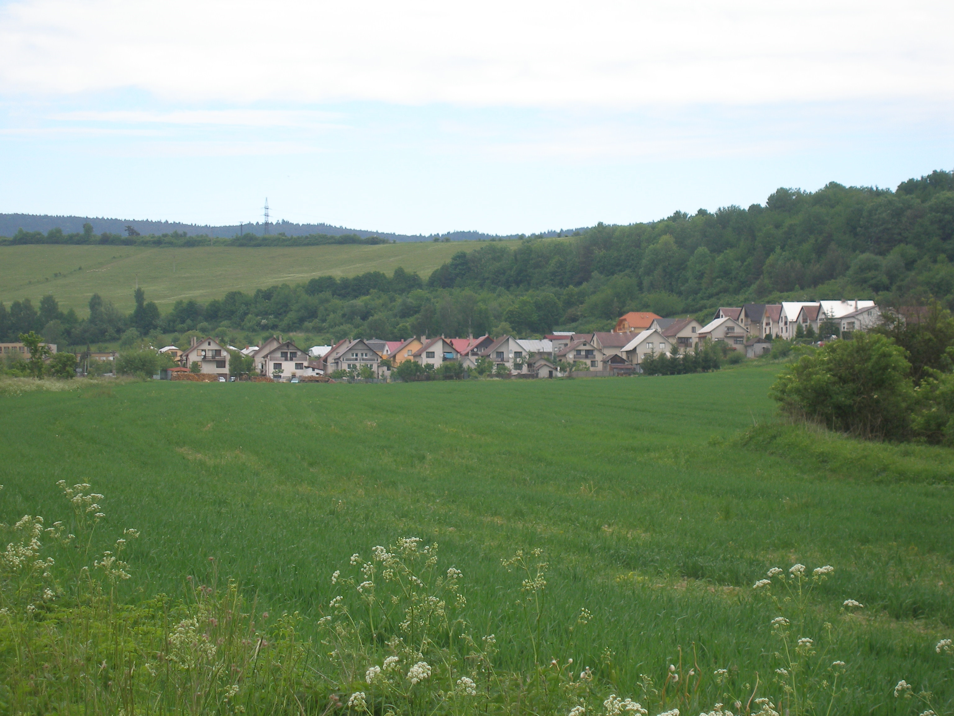 Obec Šarišské Dravce okres Sabinov